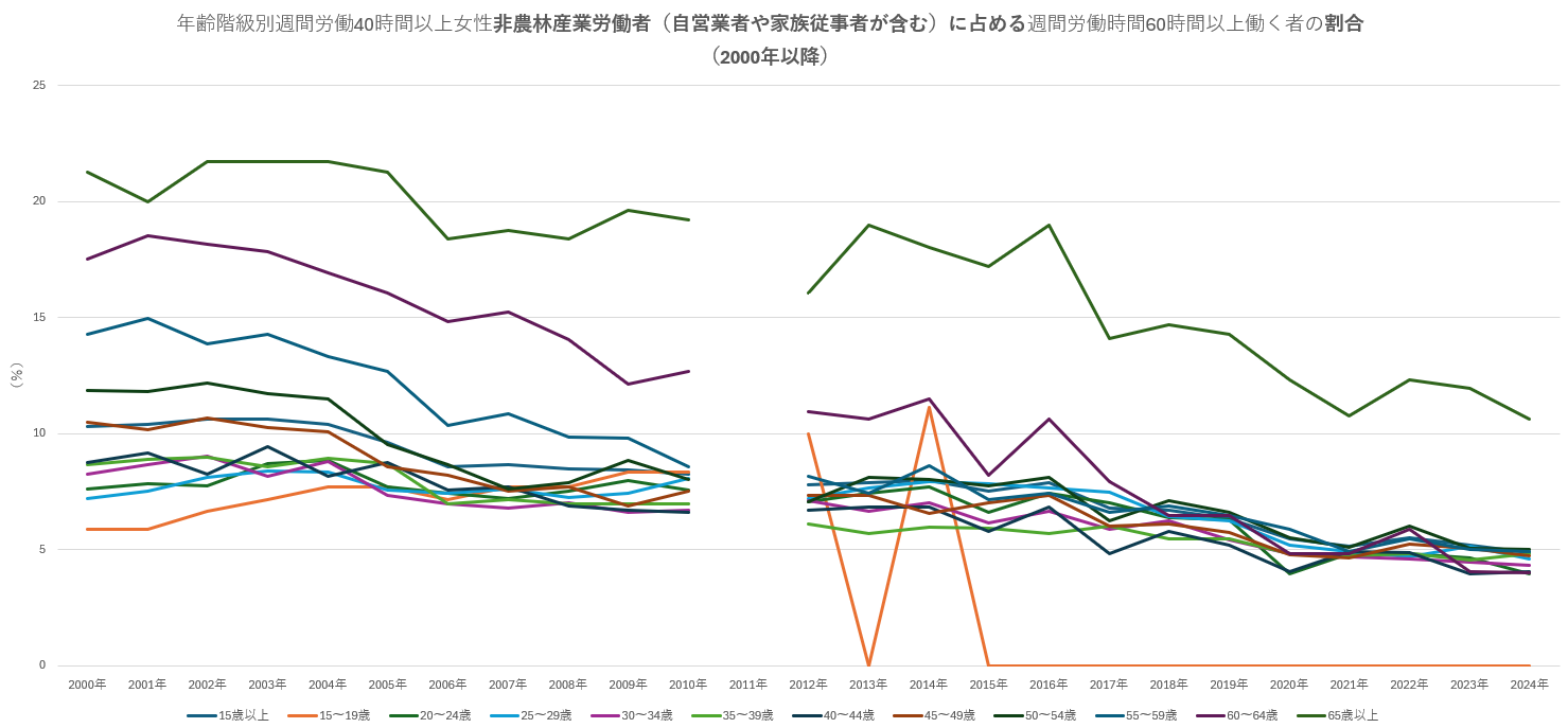 年齢階級別週労働40時間以上男性非農林業労働者に占める週60時間以上労働者の者が占める割合推移（2000年以降）